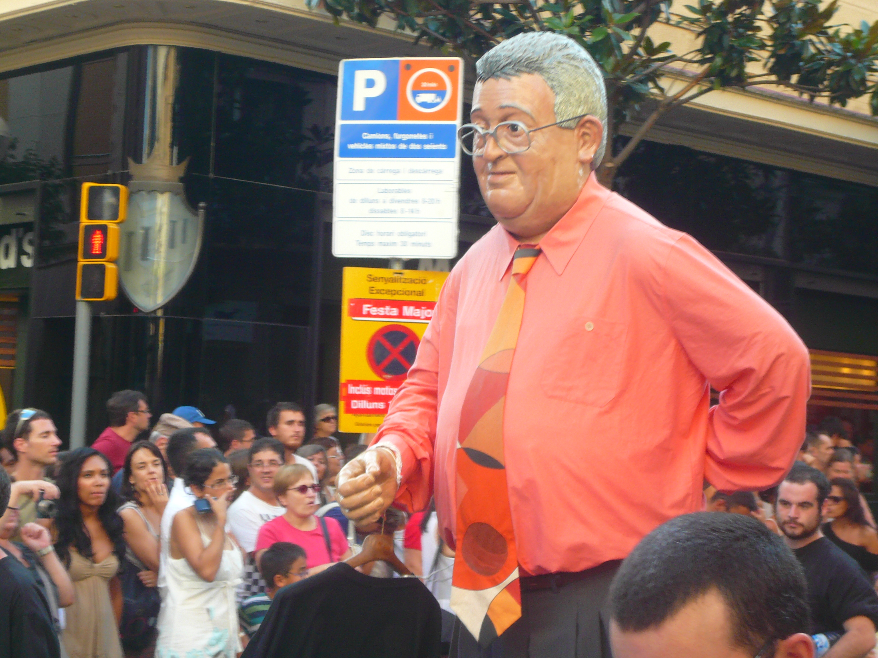 Festa Major de Gràcia 2011